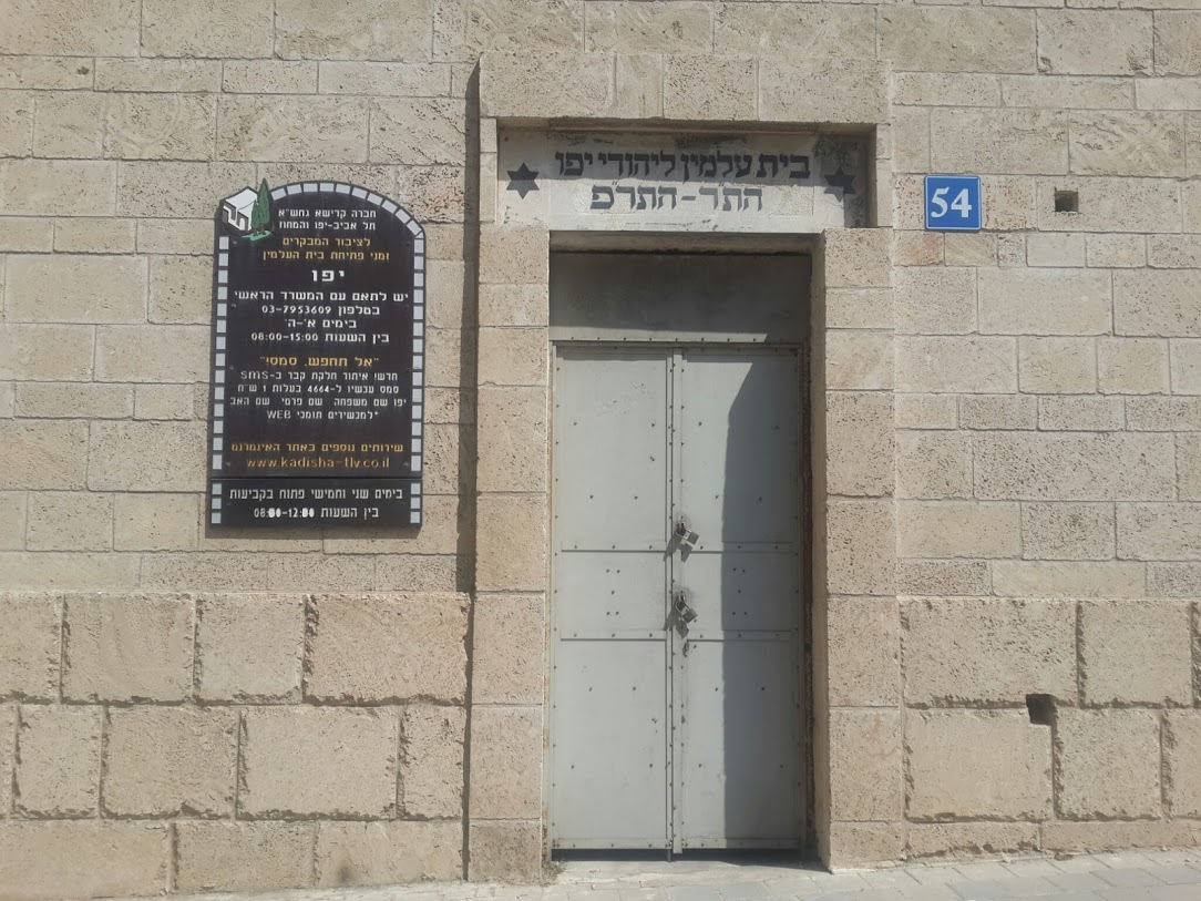 שער הכניסה לבית העלמין היהודי הישן ביפו